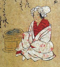 『三十二番職人歌合』、垂恵 (?)、1494年